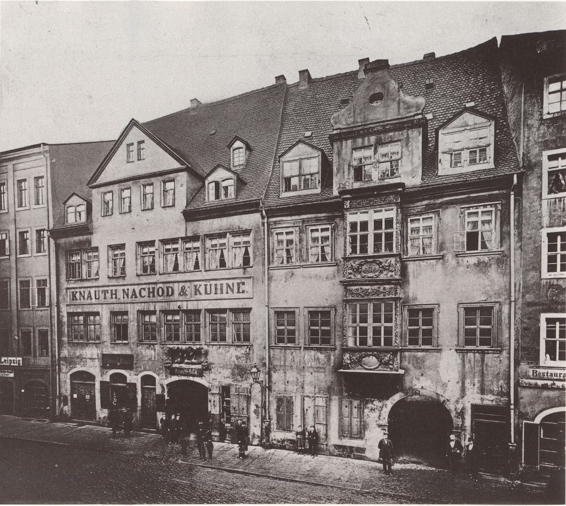 Leipzig, Brühl Nr. 84/85, seit 1878 Nr. 7/9, die Häuser „Zum weißen Schwan“, später „Zu den drei Schwanen“ (links) und „Zum roten Ochsen“. Im Haus „Zu den drei Schwanen“ fanden ab 1743 die „Großen Konzerte“ statt, Vorläufer der späteren Gewandhauskonzerte; das Gebäude wurde 1879 abgebrochen.